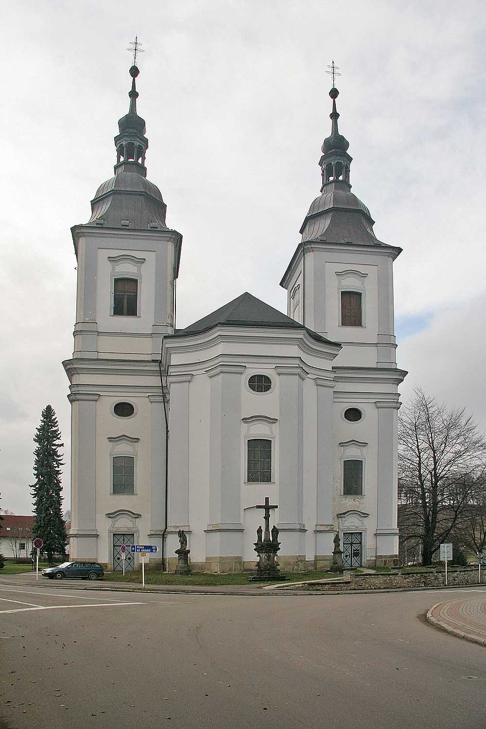 Kostel Svatého Václava v Žamberku, district Ústí nad Orlicí autor: Prazak date: 21. 11. 2006